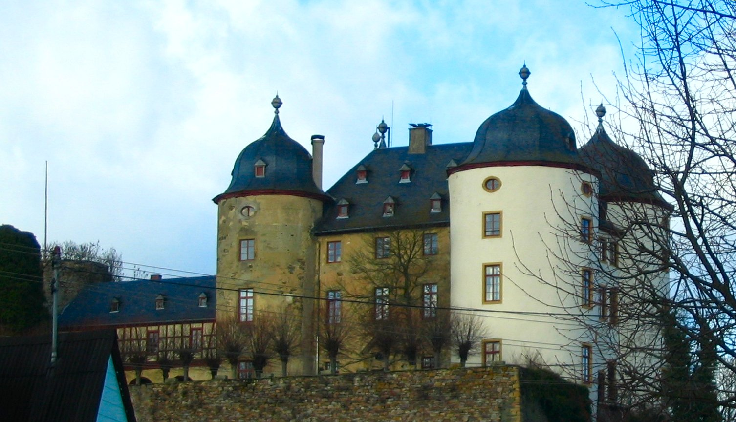 Schloss Gemünden im Hunsrück